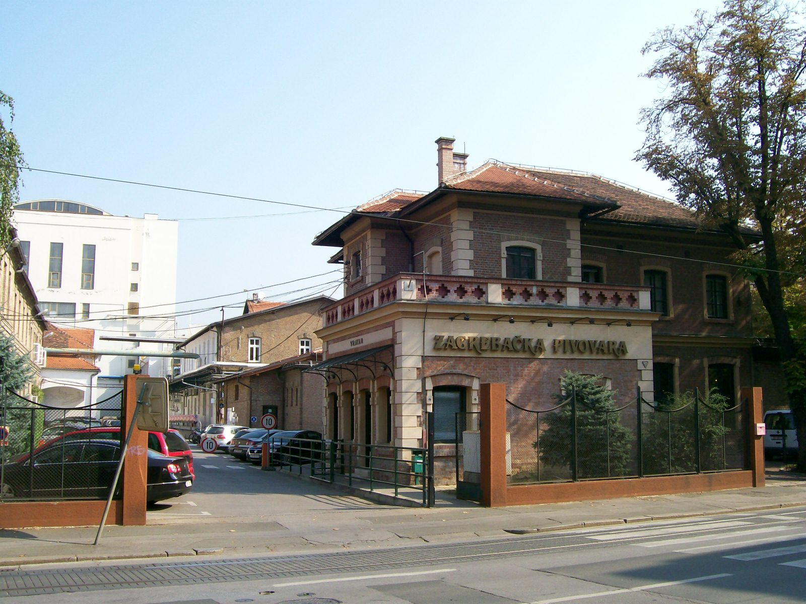 Zagrebačka pivovara, ulaz Ilica, Zagreb